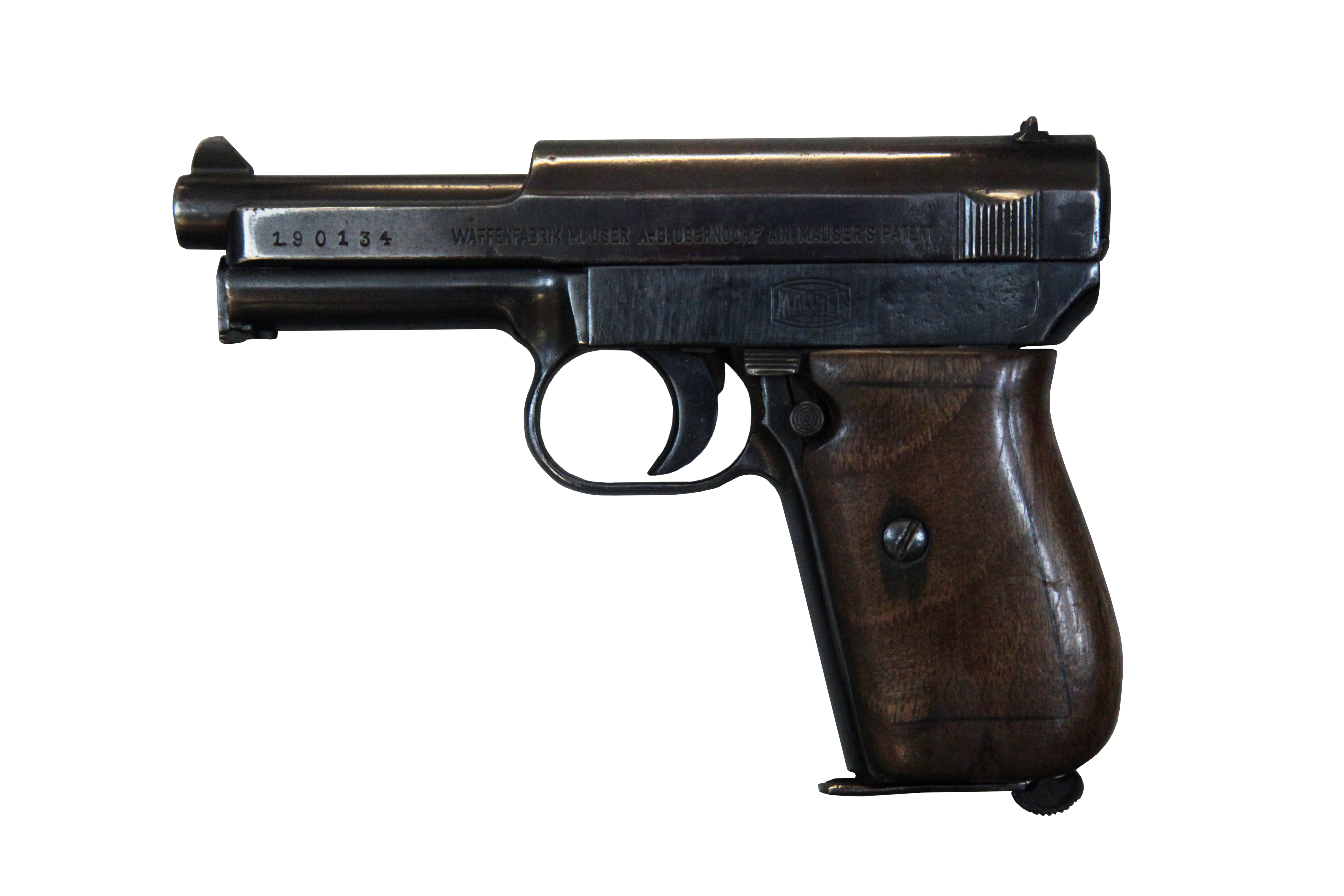 Mauser Model 1914, Germany. On display at Musée de l'Armée (Inv. 996.210)